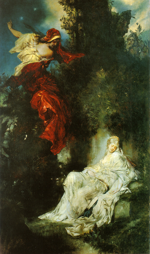 The Sleeping Snow Whitelabel QS:Len,"The Sleeping Snow White" label QS:Lde,"das schlafende Schneewittchen"